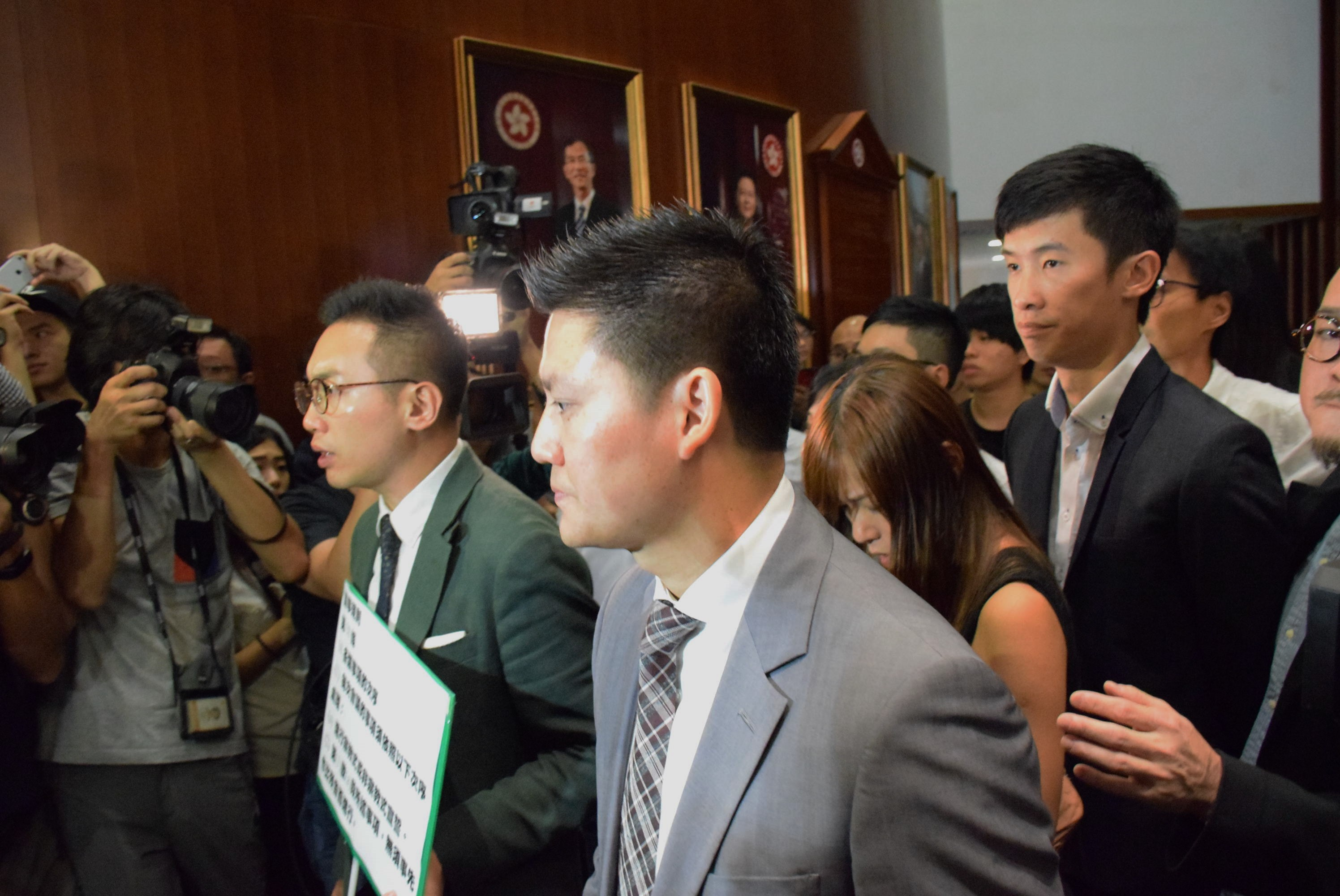 多名非建制派議員護送梁頌恆及游蕙禎進入立法會會議廳。